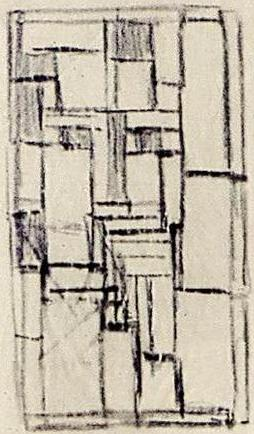 Theo van Doesburg. Compositie voor glas in lood. 1917 (?). Potlood op transparant papier. Rotterdam, Nederlands Architectuurinstituut (inv.nr. AB5407).